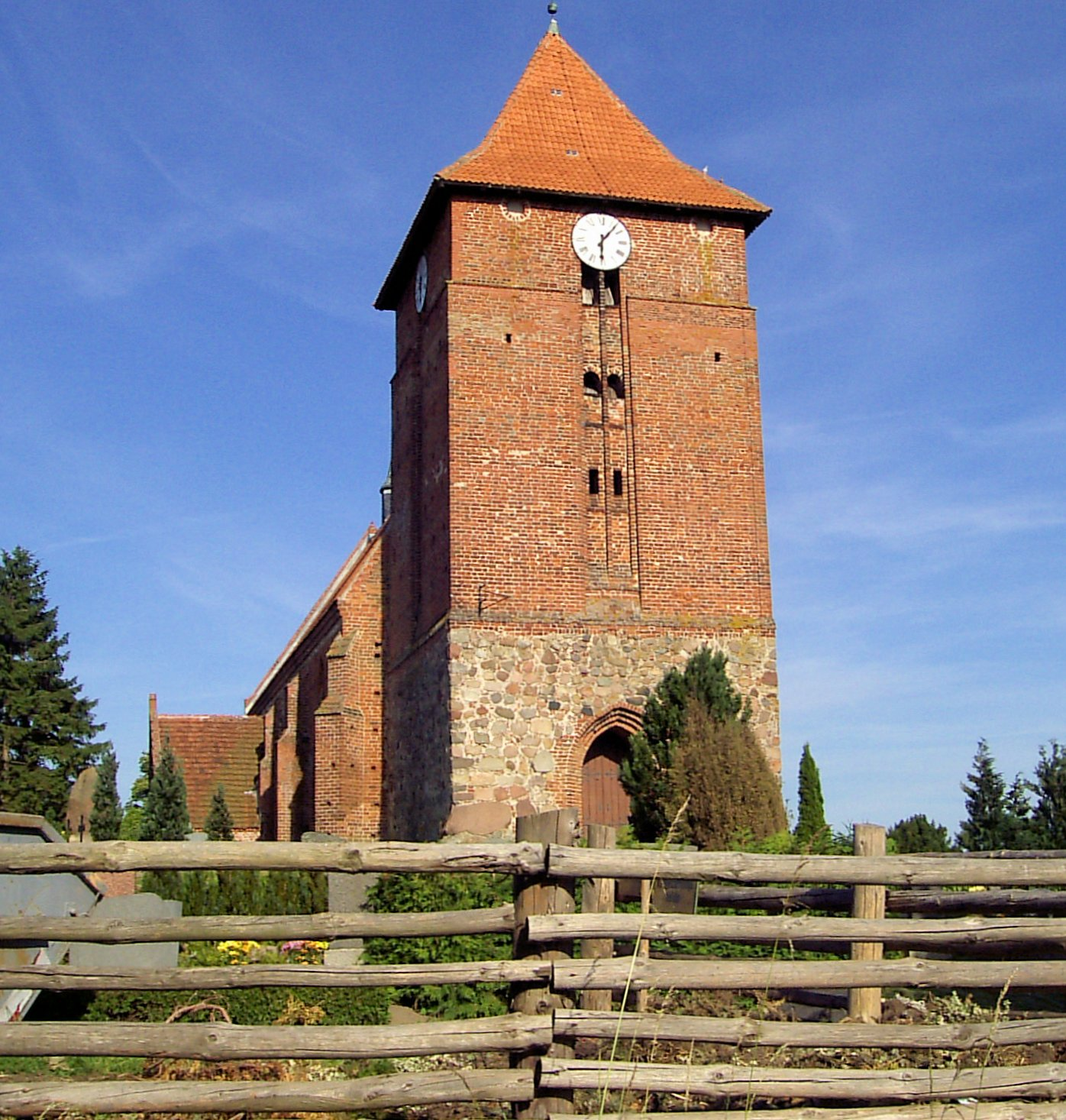 zweischiffige Kirche in Tarnow, Deutschland